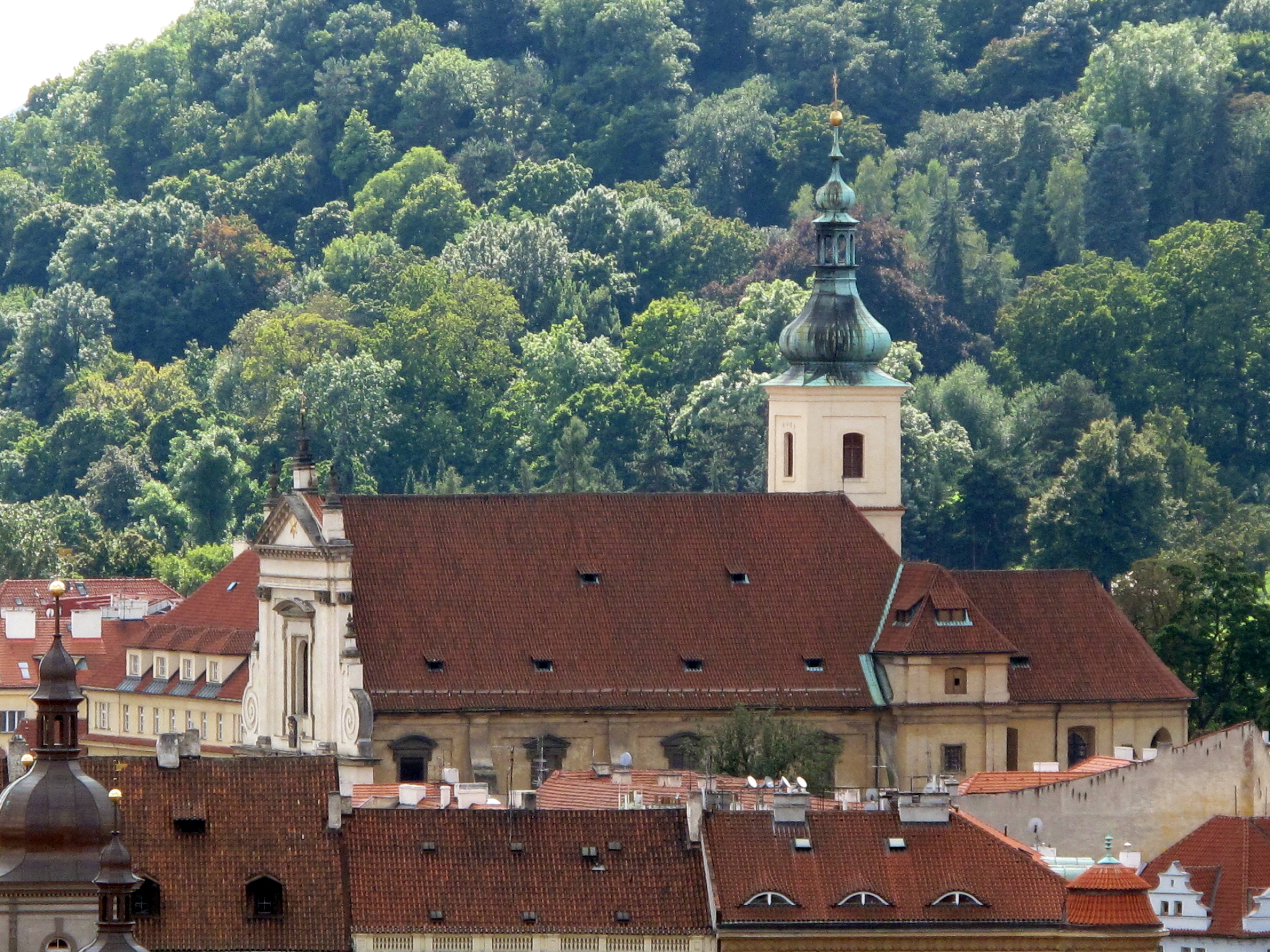 Výhled od Pražského hradu